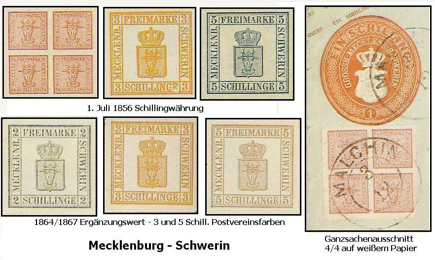 Markenbilder aus Mecklenburg-Schwerin gesacnnt W.Steven 09:56, 11. Jan. 2007 (CET) 2007